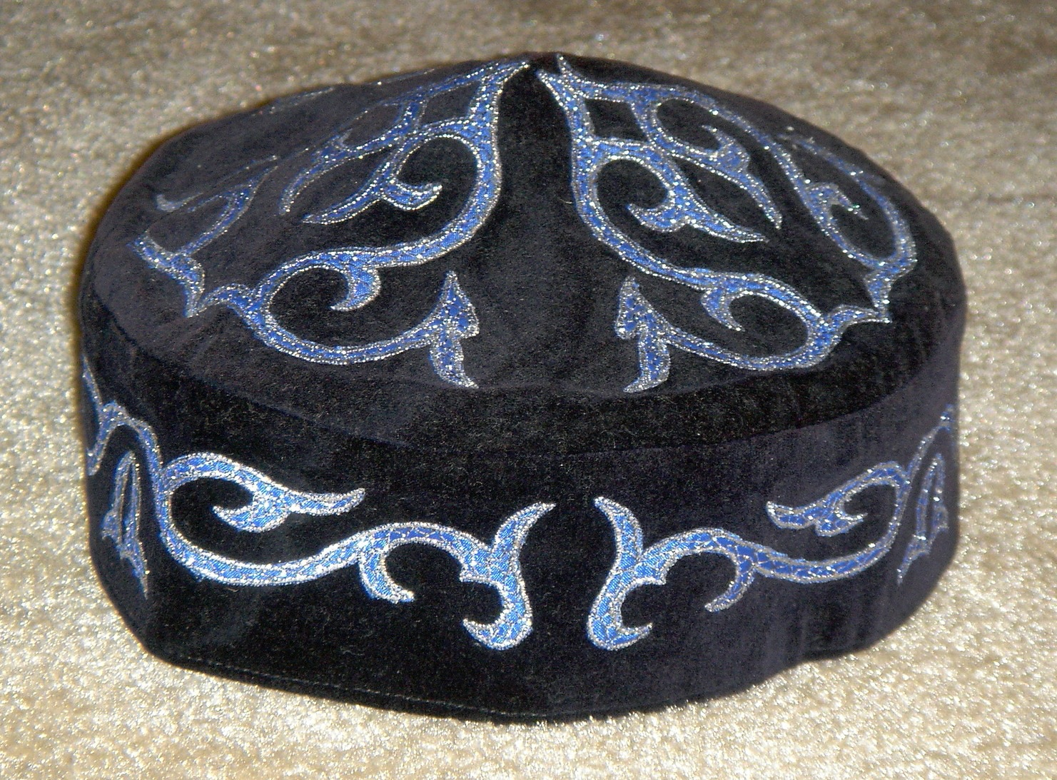 Kazakh Tubeteika.